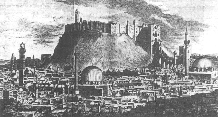 Aleppo